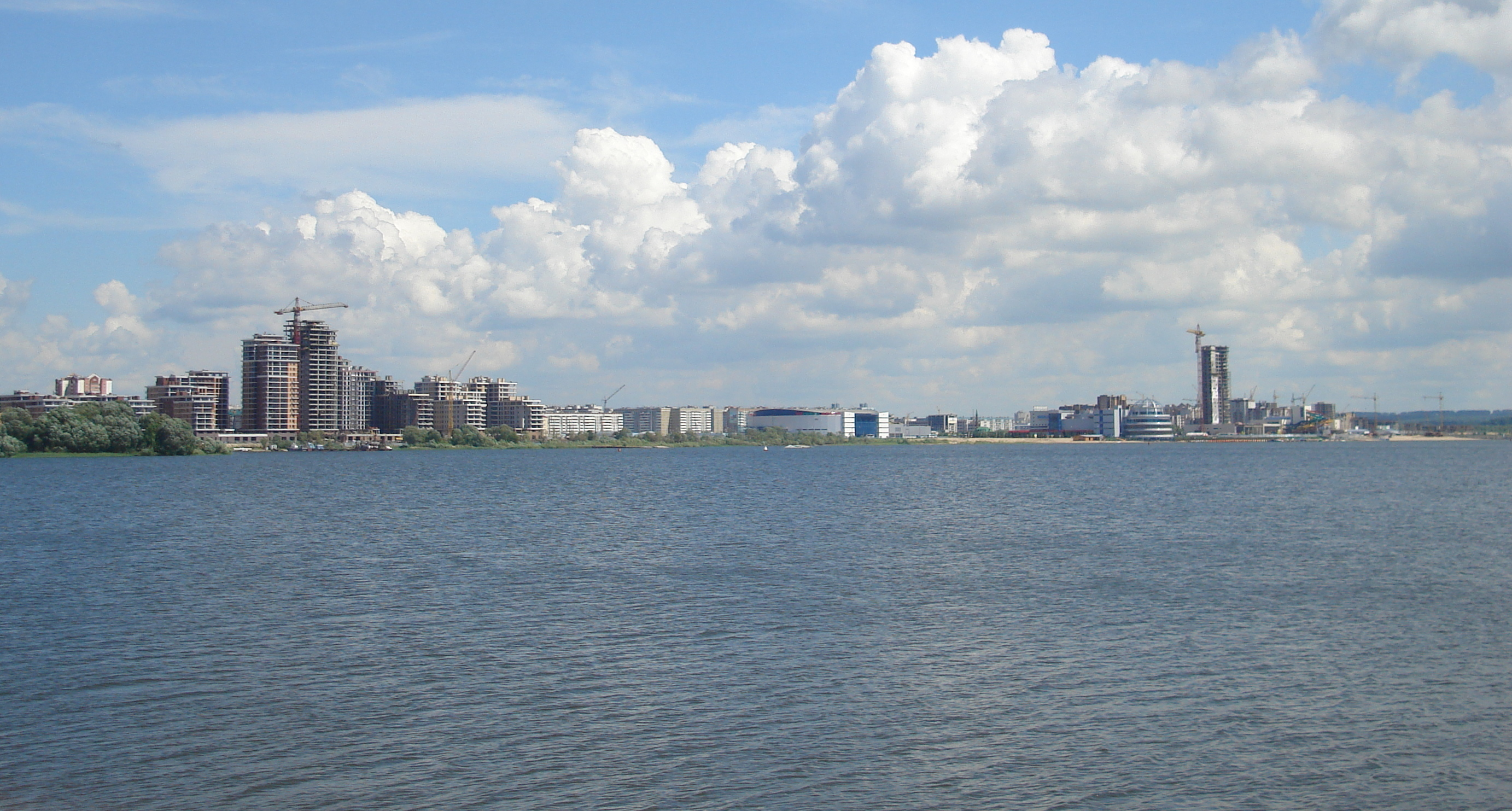 Kazanka